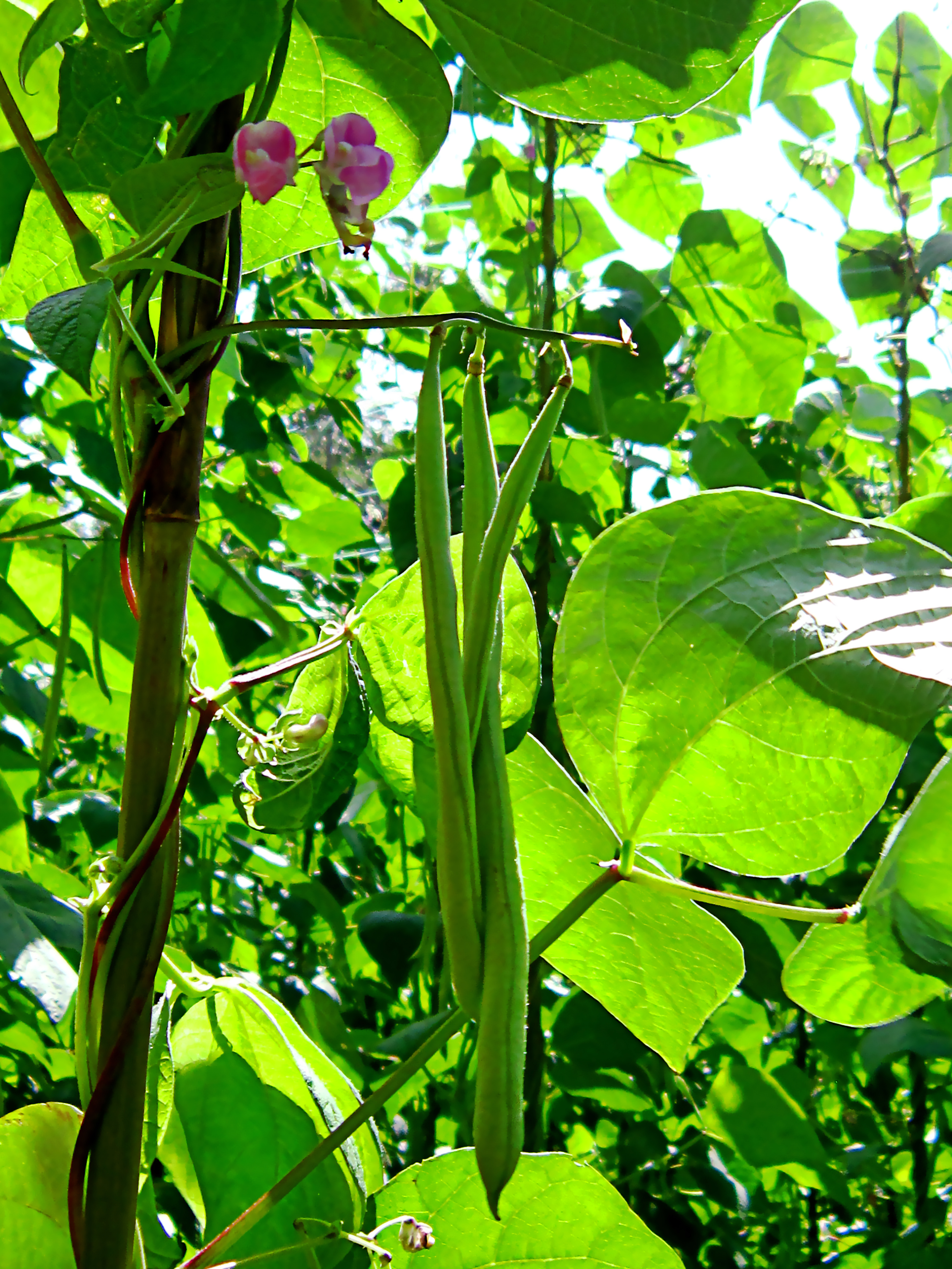 Hoa, lá và quả đậu cô ve (còn gọi là đậu que) ở An Giang, Việt Nam.